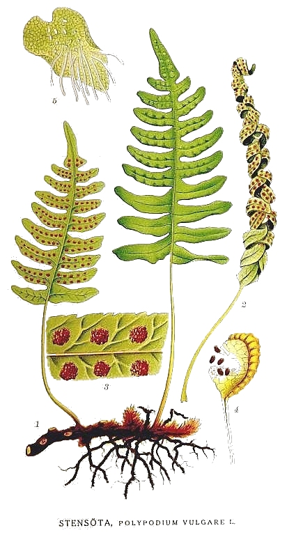 Original Description Stensöta, Polypodium vulgare L.